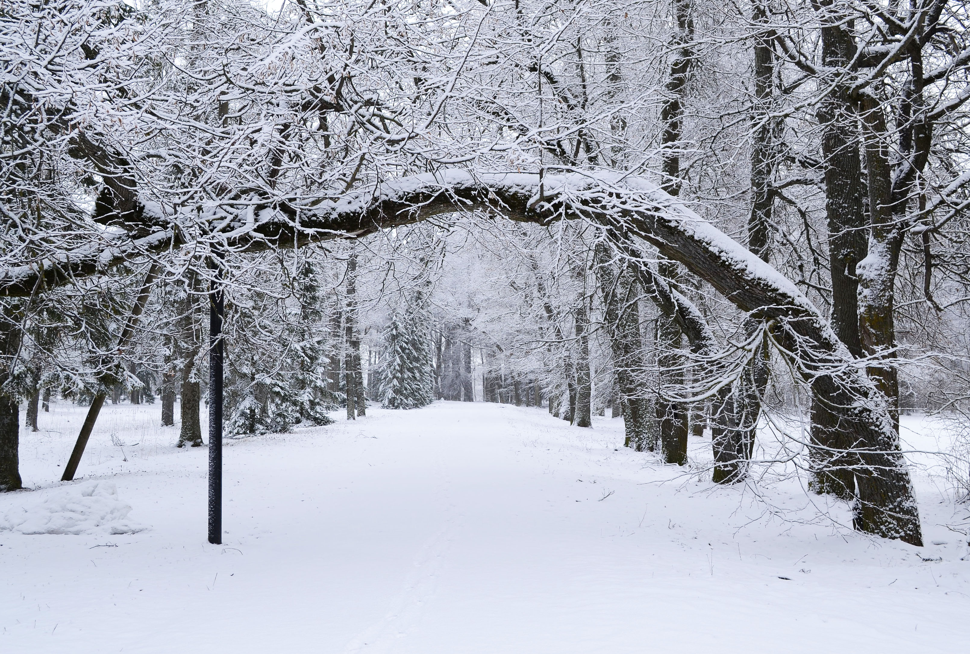 Vaade Luunja mõisa pargi alleele 2016. aasta talvel.